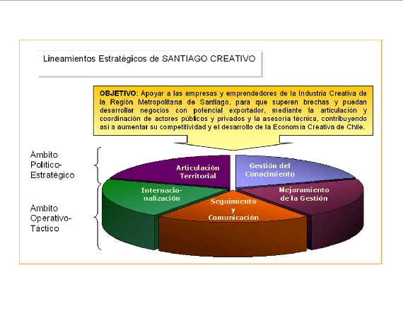 Gráfico em espanhol sobre o alinhamento estratégico do Santiago Creativo